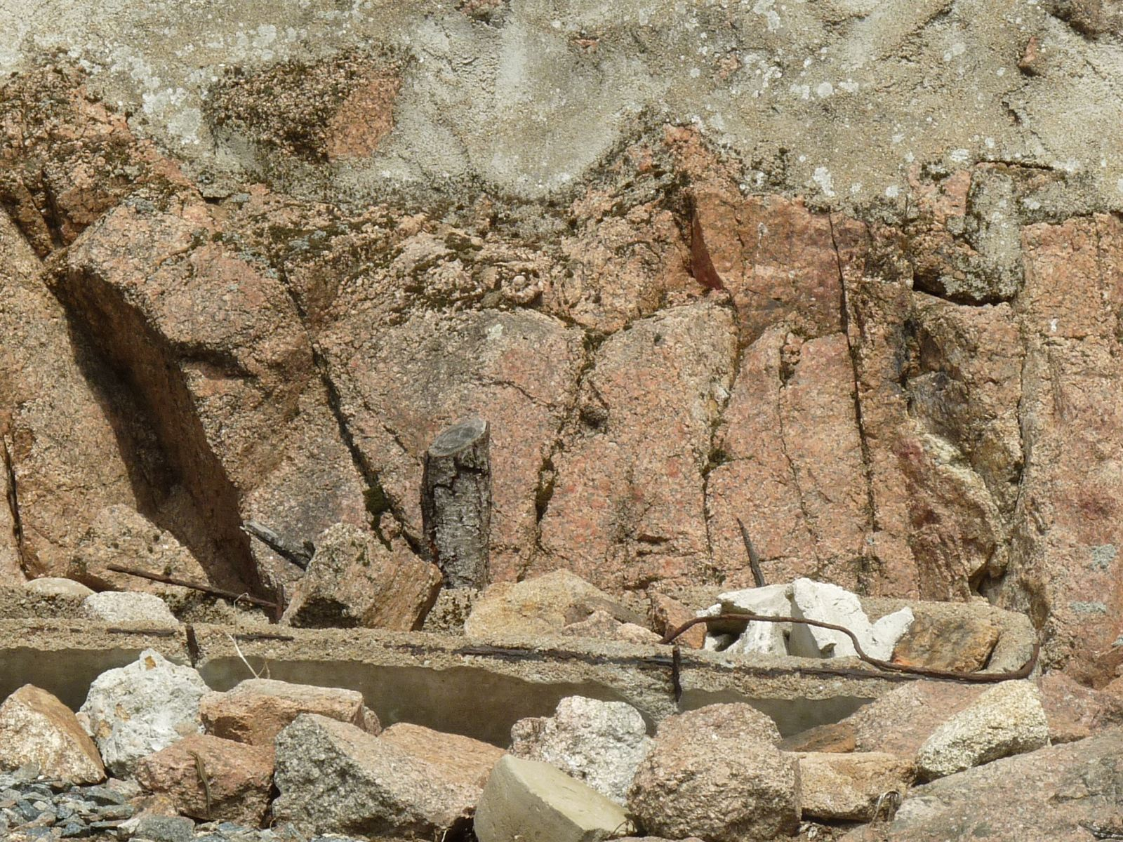 soubassement en granit rose d'une maison de Chirac, Charente, France